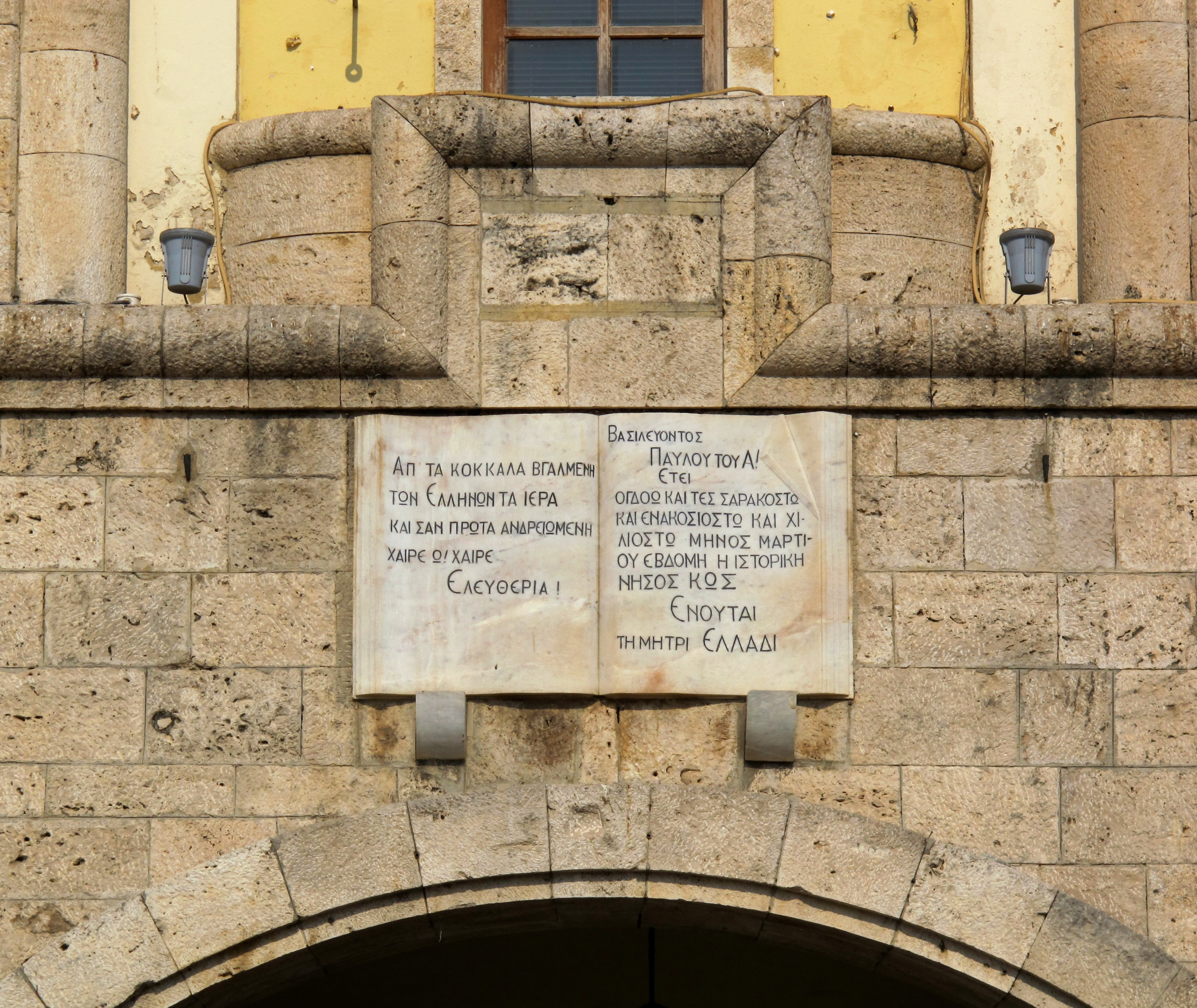 Kos città, piazza eleftherias, edificio razionalista, targa